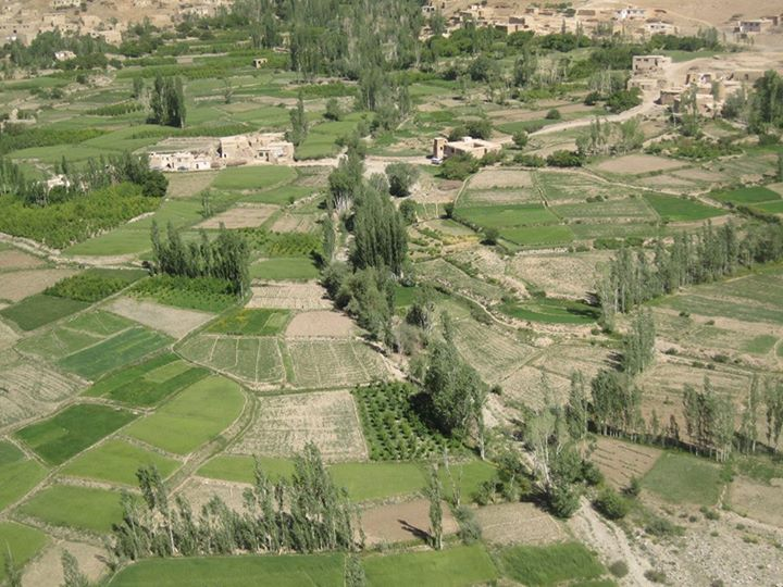 زمین های کشاورزی در منطقه سوخته علودانی